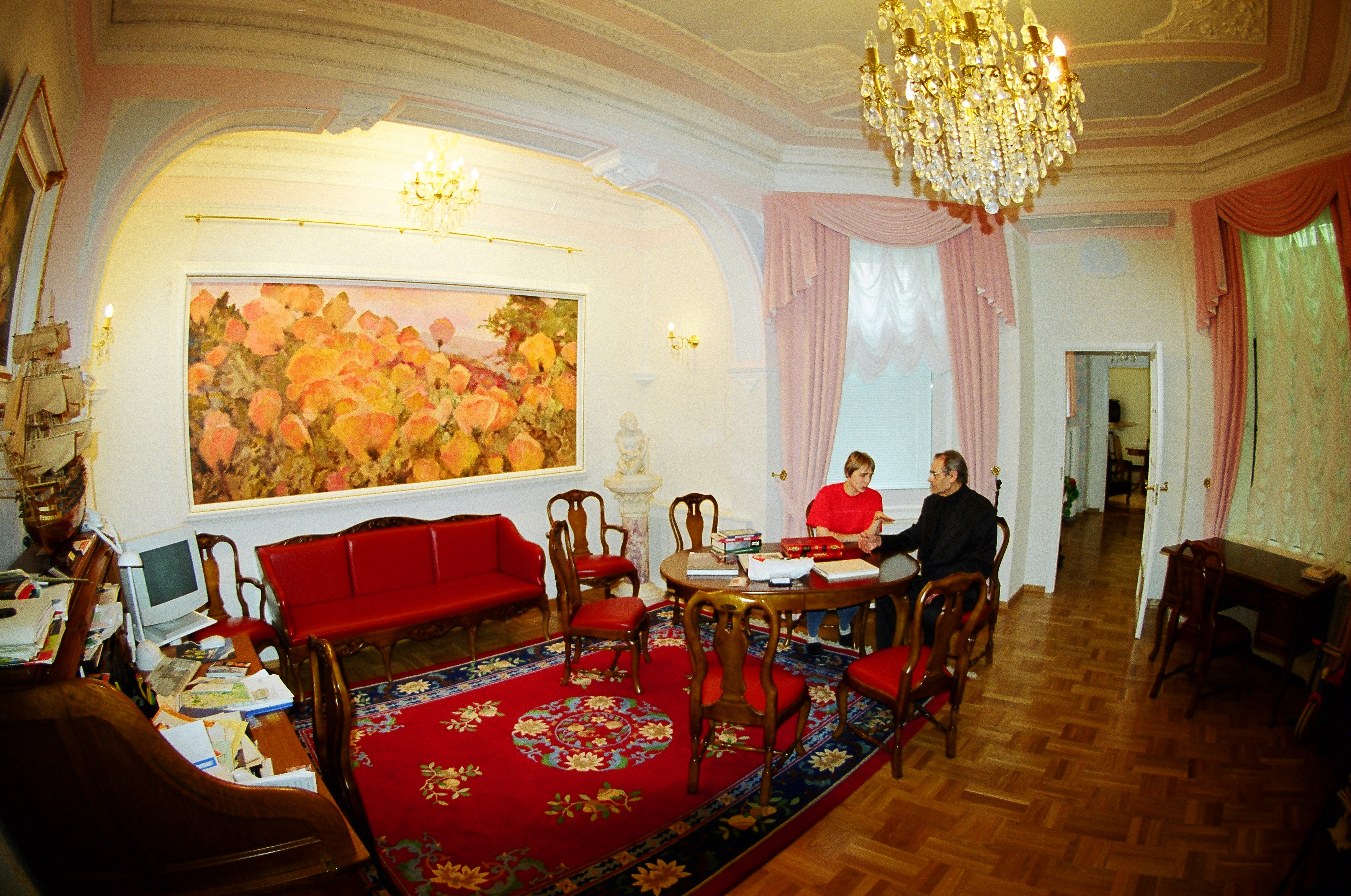 Лев Константинович Богомолец возле картины "Маки" в квартире Марины Николаевны Колотило. Слева - Марина Колотило